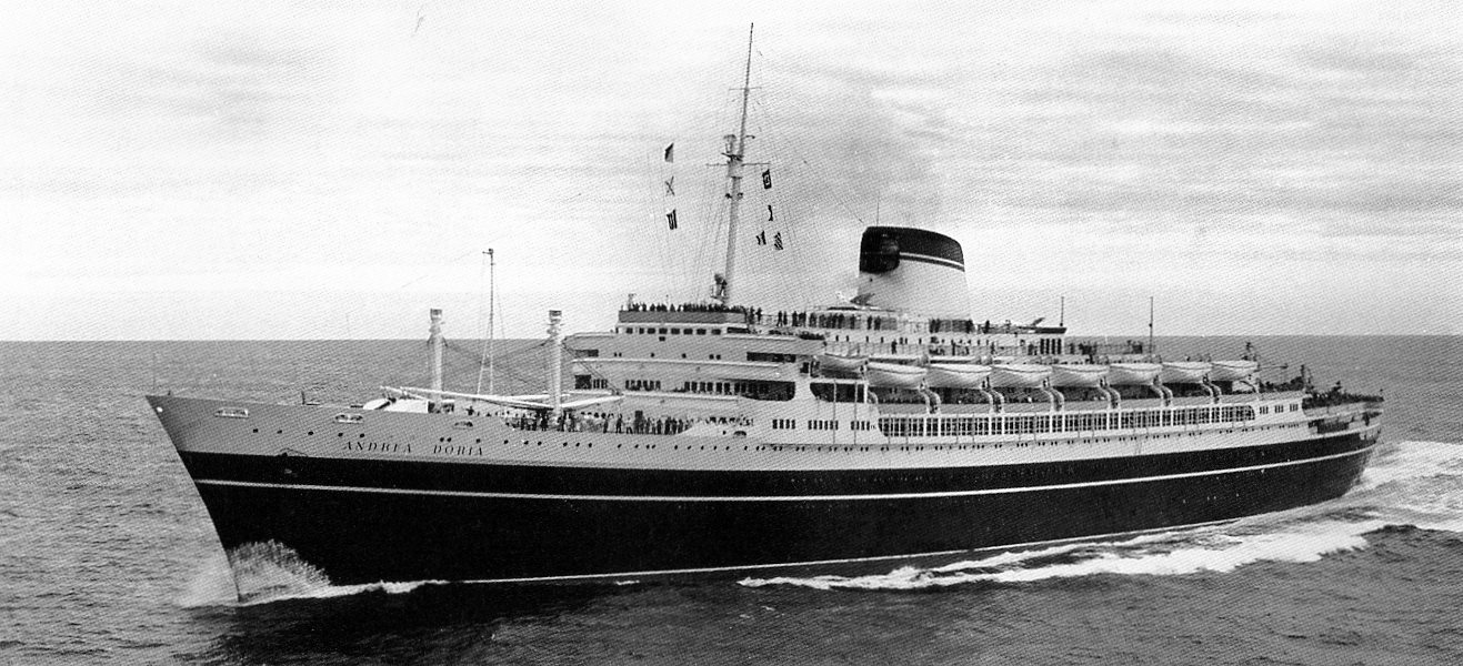 La turbonav Andrea Doria